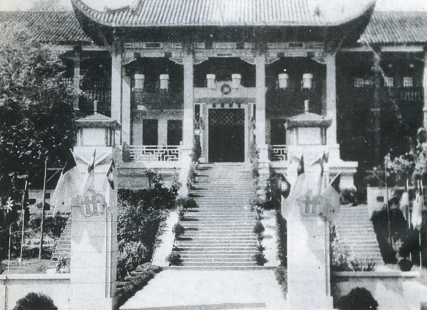 中国抗日战争时期国民政府礼堂。